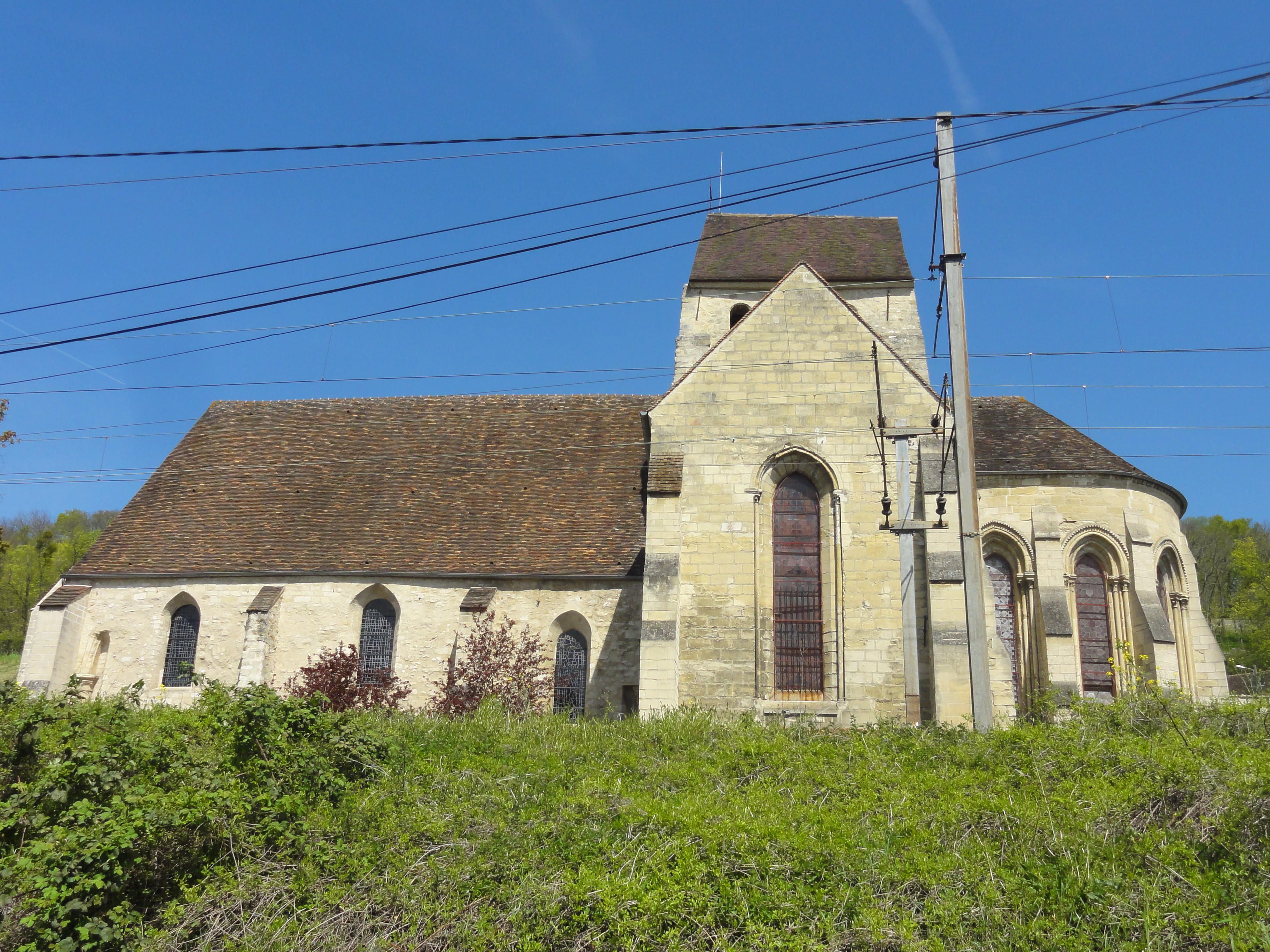 Église Saint-Pierre-aux-Liens de Vaux-sur-Seine - voir titre.